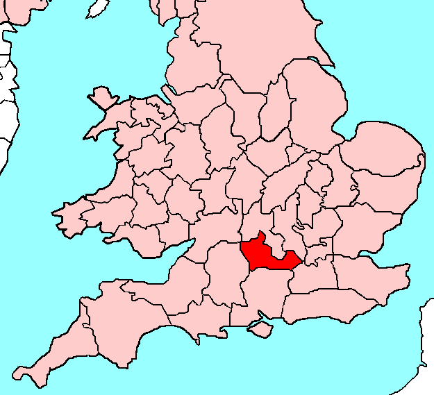 Berkshire